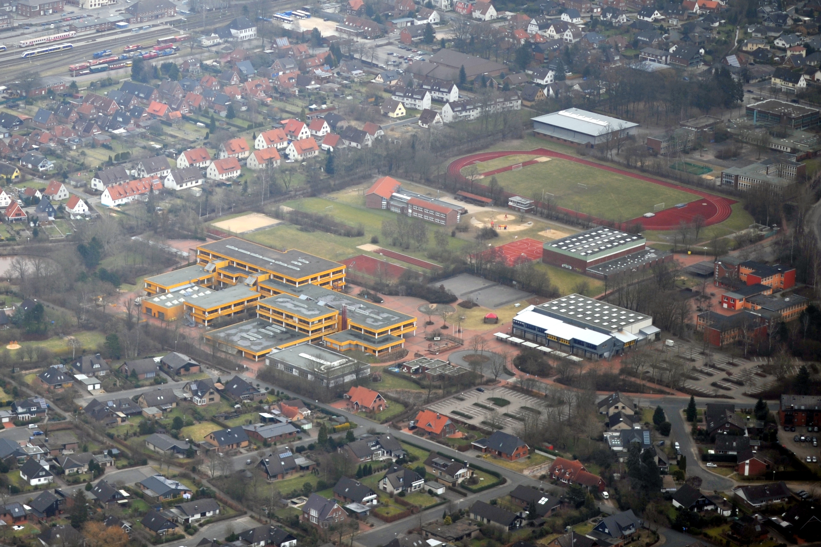 Fotoflugkurs Cuxhaven 2013: Gymnasium Bremervörde